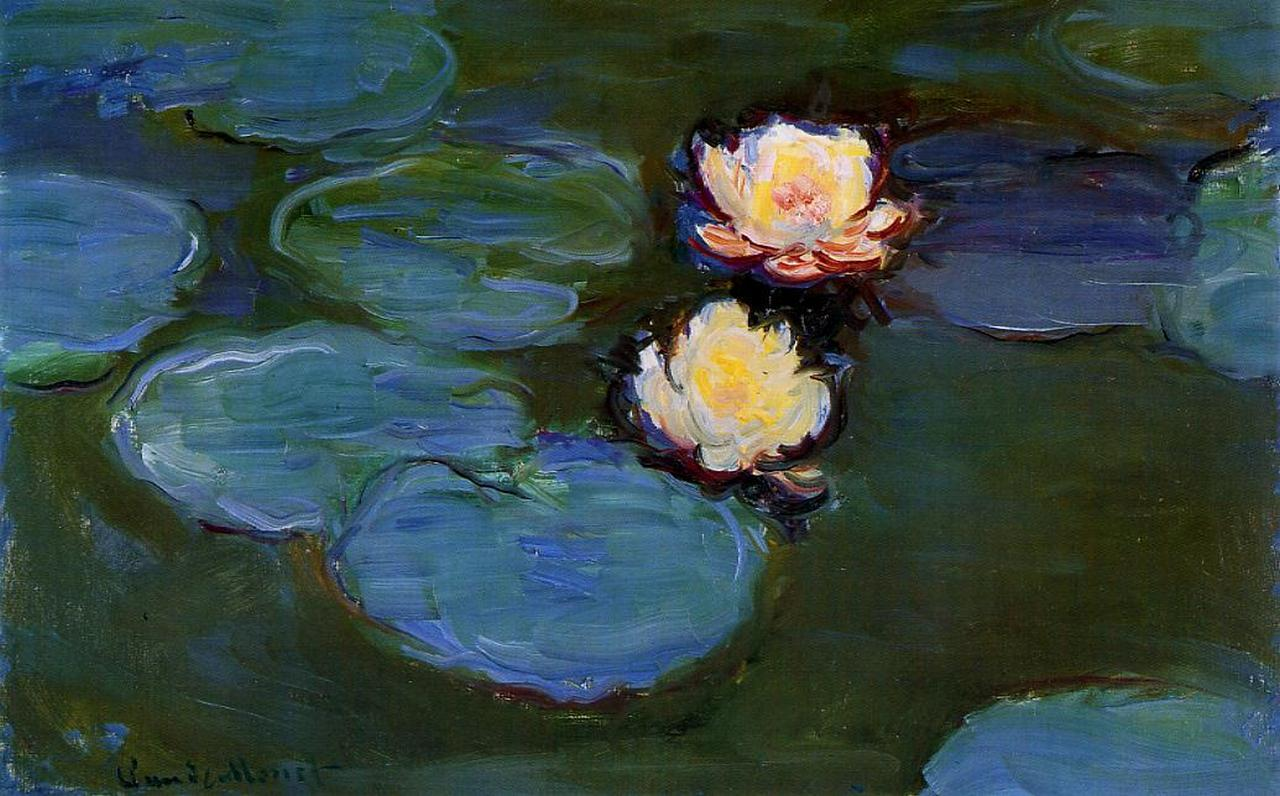 Water Lilies